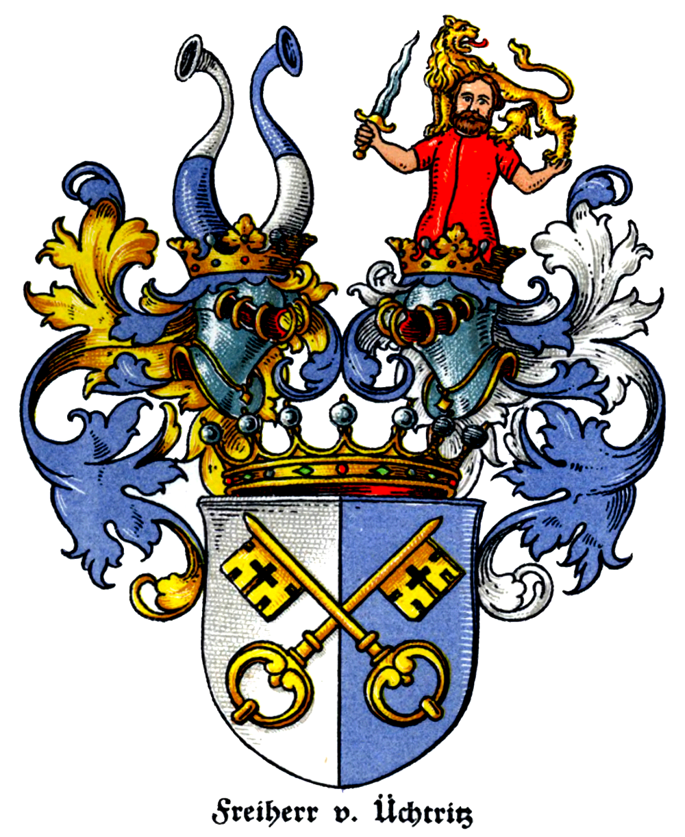 Wappen der Freiherrn von Uechtritz